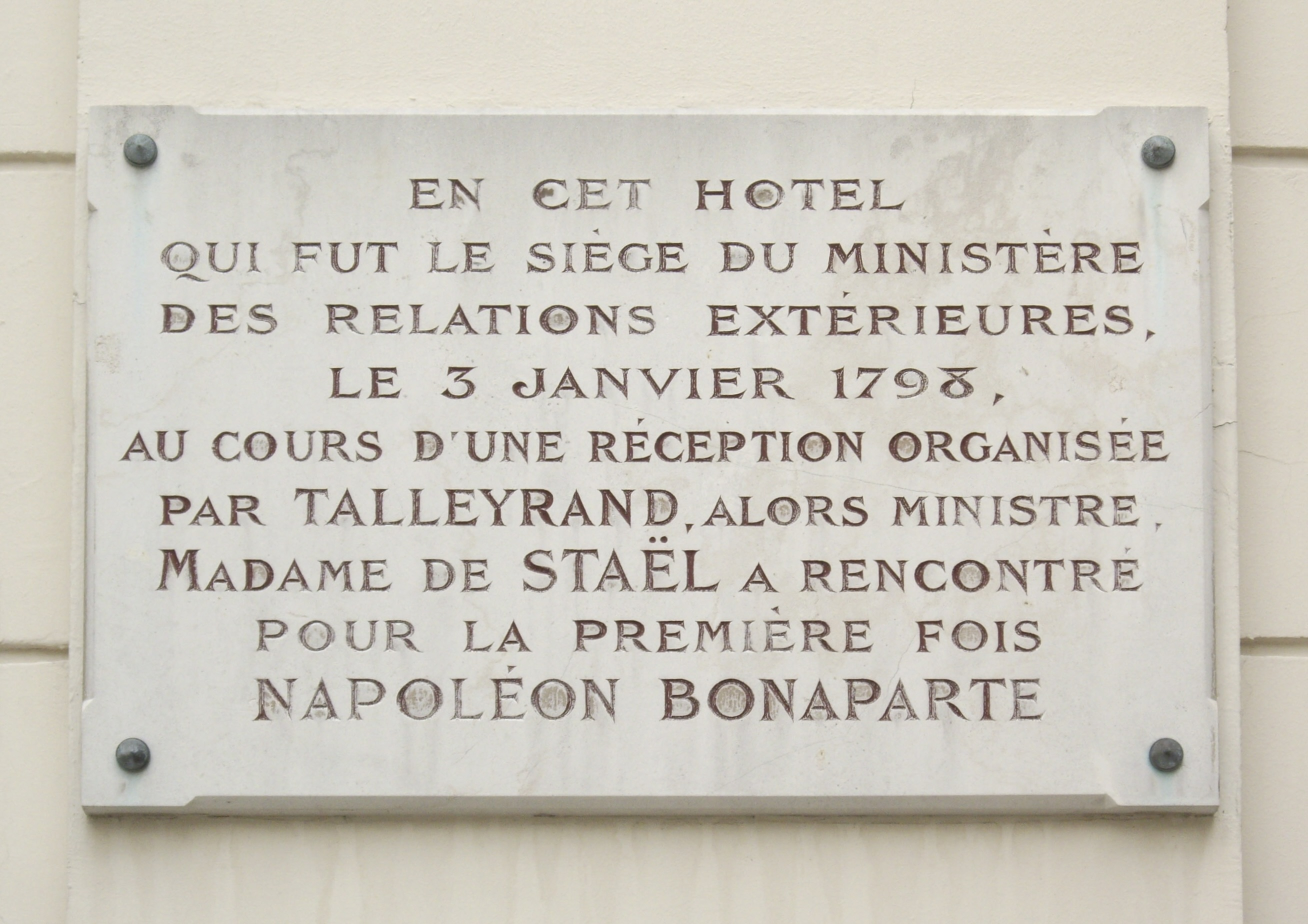 Plaque apposée dans la cour de l'hôtel de Galliffet, où se trouve l'actuel Istituto di Cultura Italiana di Parigi, au n° 50 de la rue de Varenne, Paris 7e.« En cet hôtel qui fut le siège du ministère des Relations extérieures, le 3 janvier 1798, au cours d'une réception organisée par Talleyrand, alors ministre, Madame de Staël a rencontré pour la première fois Napoléon Bonaparte. »